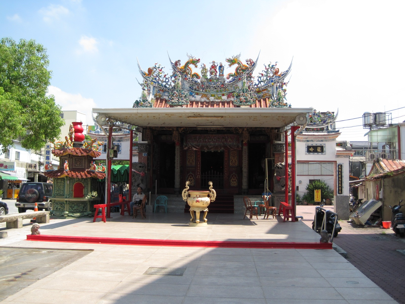 中文（台灣）: 臺南市安平妙壽宮正面。